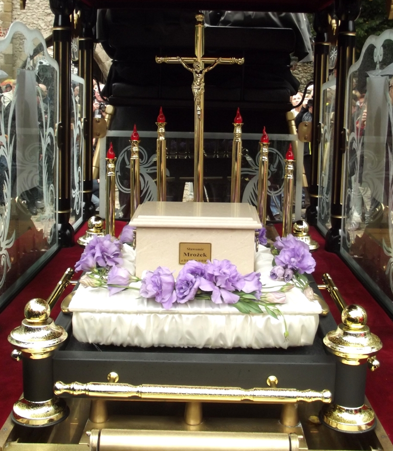 Zdjęcie zrobione podczas pogrzebu Sławomira Mrożka w Krakowie.